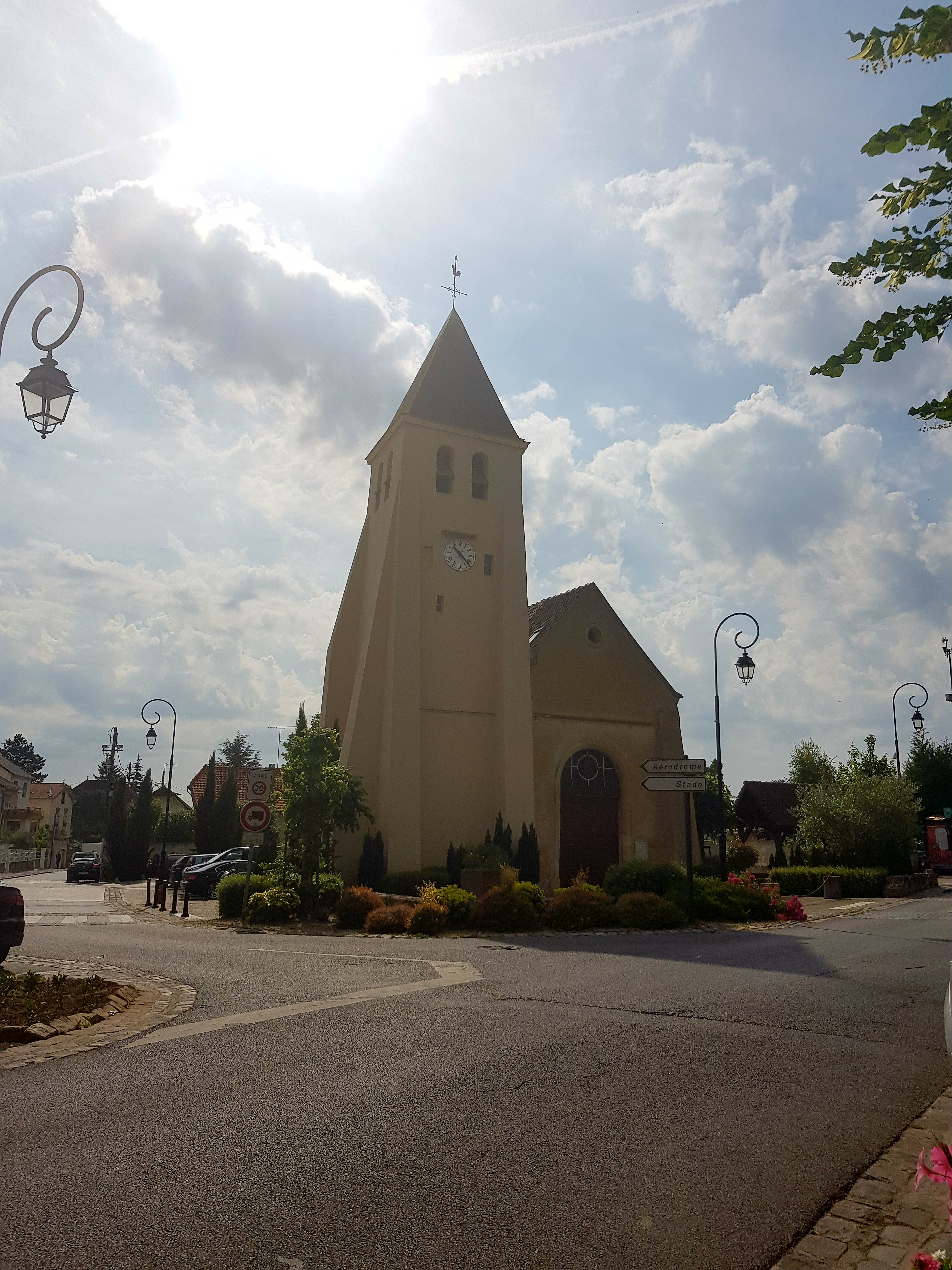 Photo récente de l'eglise de Moisselles